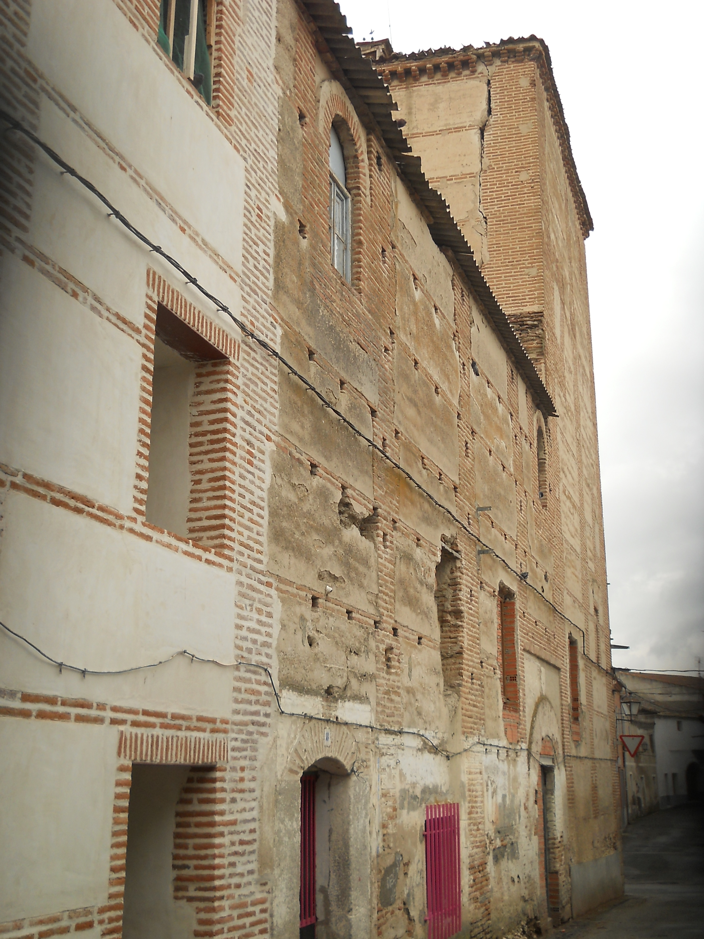 Palzzo del Marchese di Fontiveros, Fontiveros, Ávila, Spagna